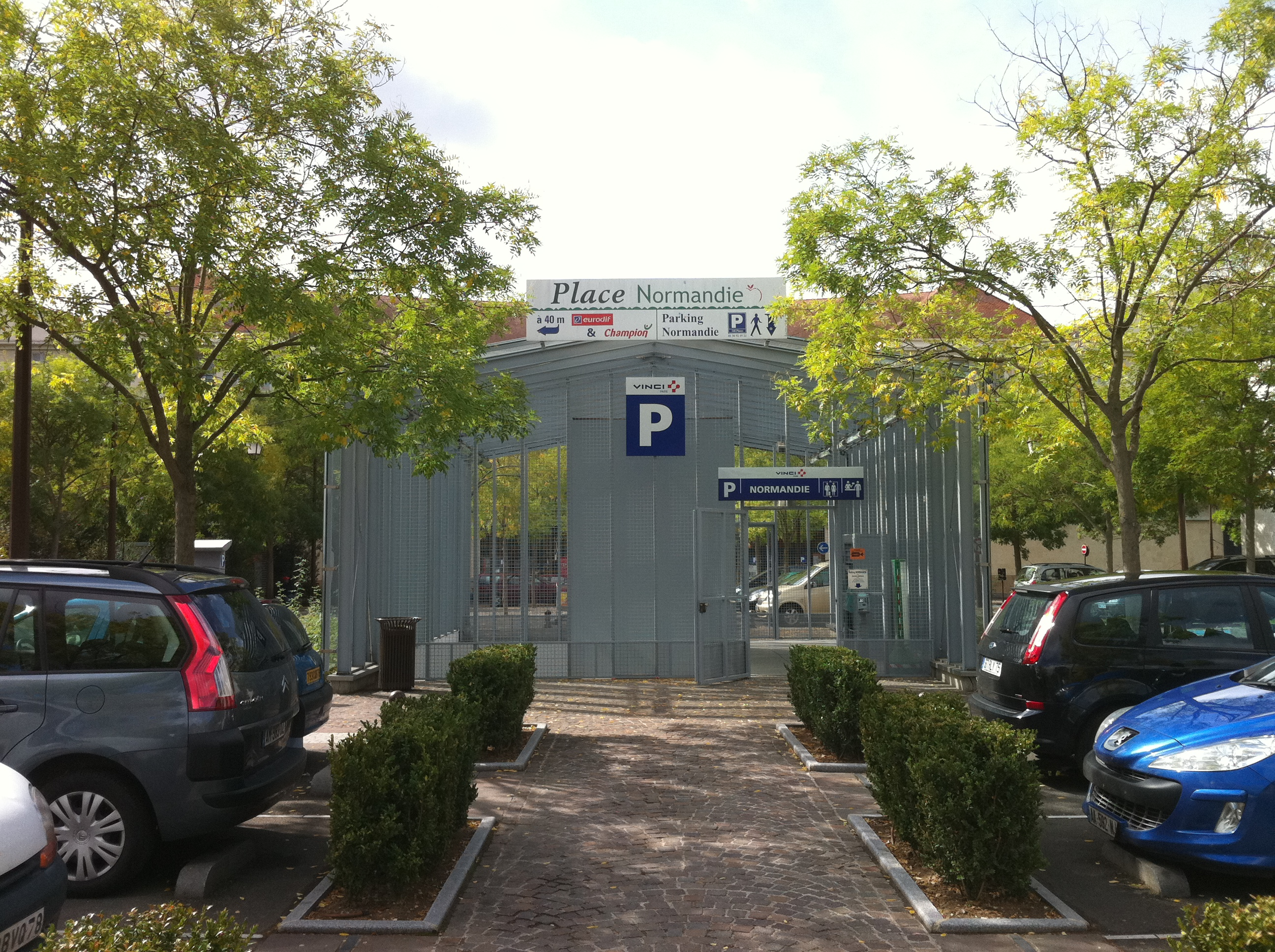 Entrée du parking Normandie à Mantes-la-Jolie.